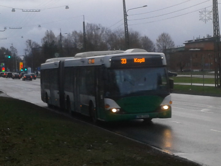 Scania OmniCity CN94 UAEB #2798